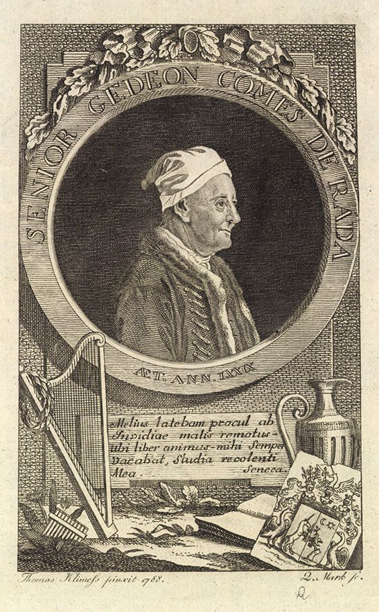 Ráday, Gedeon, 1713 bis 1792; Thomas Klimess pinxit, del. Quirin Mark (1753-1811).